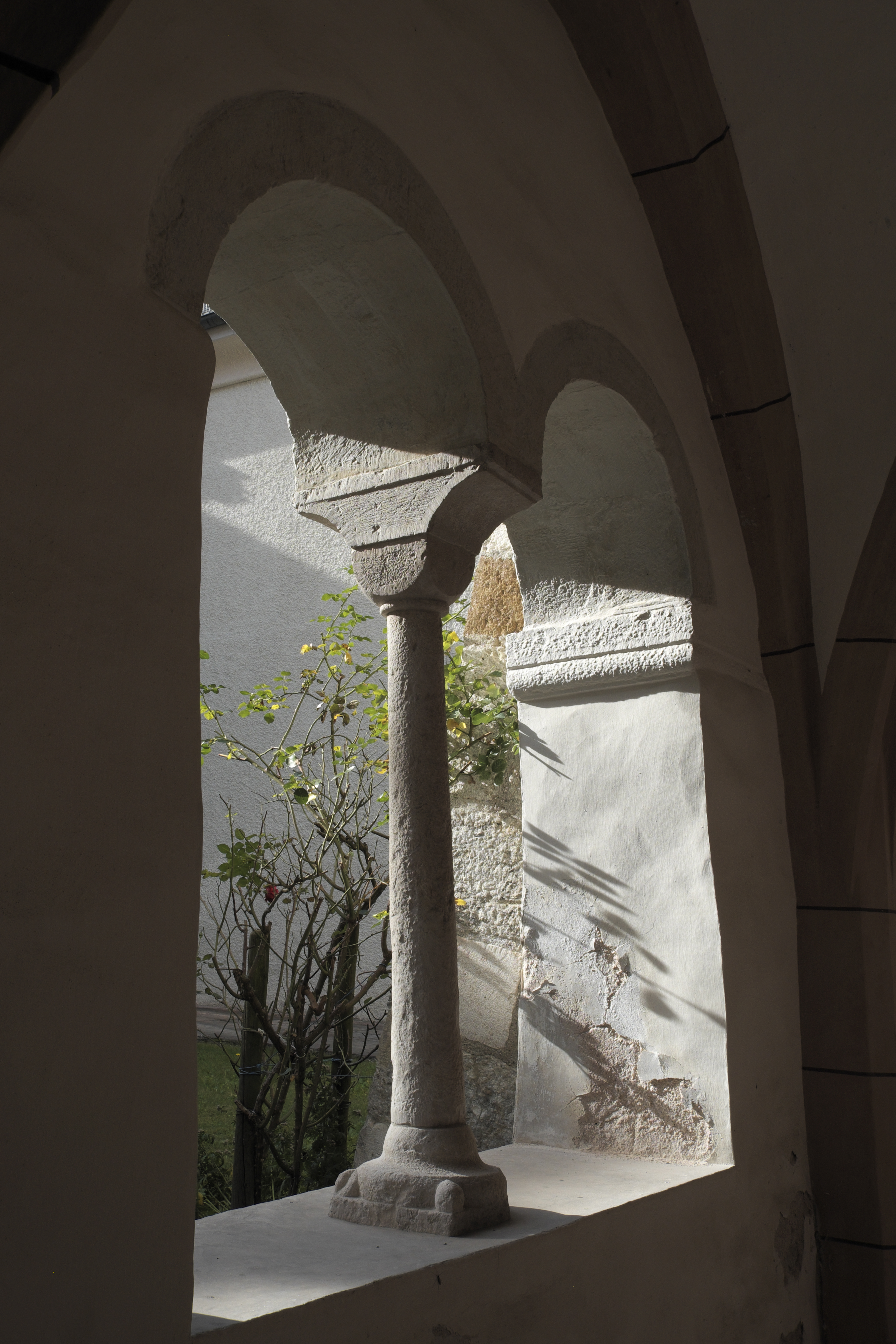 Kloster St. Zeno in Bad Reichenhall im Landkreis Berchtesgadener Land (Bayern/Deutschland), Kreuzgang